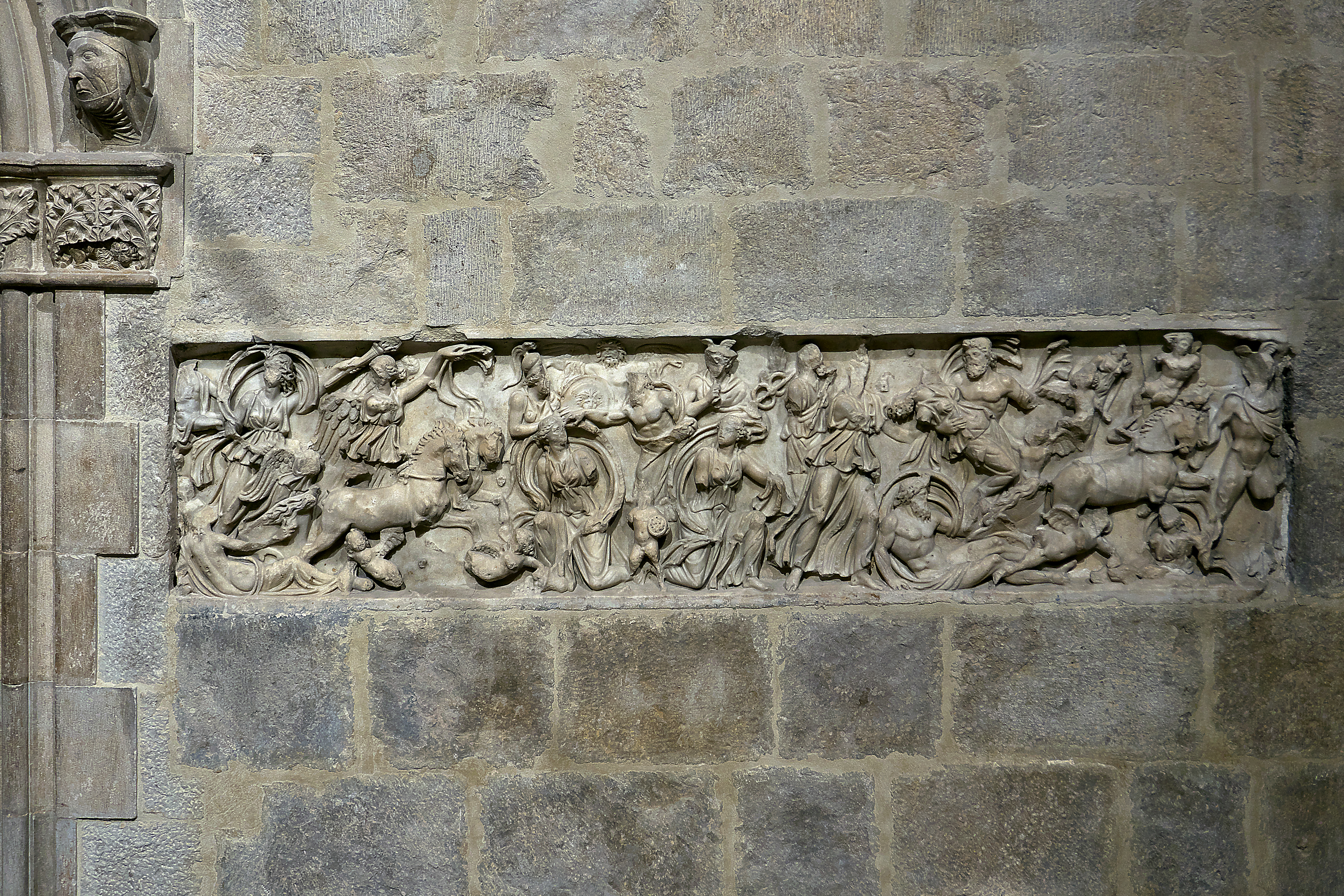 Cara frontal del sarcófago romano del siglo IV d.C., tallado en mármol, procedente de un taller de Portus Ilicitanus, Santa Pola. Proserpina es raptada por Plutón, dios del inframundo y su madre Ceres la busca y toma venganza.